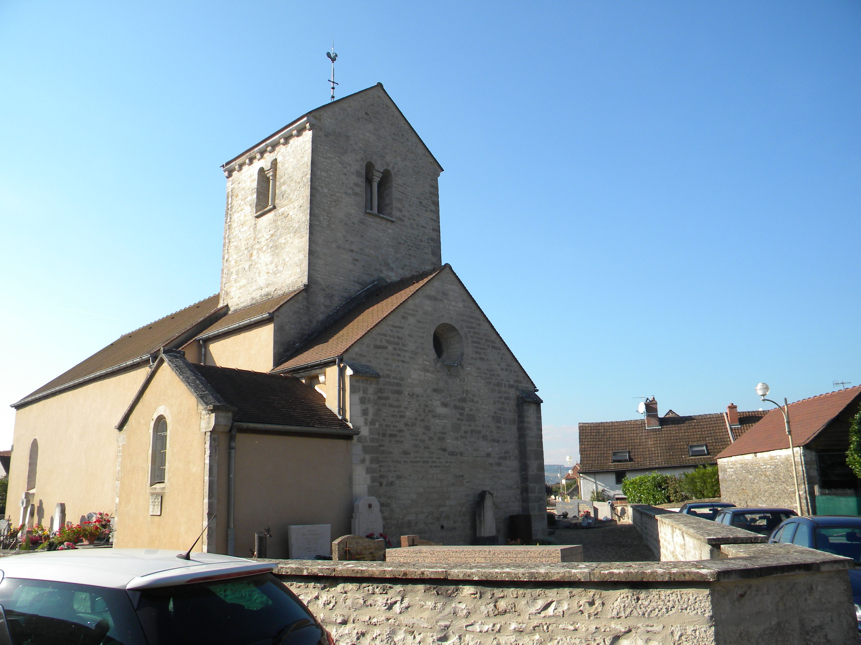 Eglise de Quincey